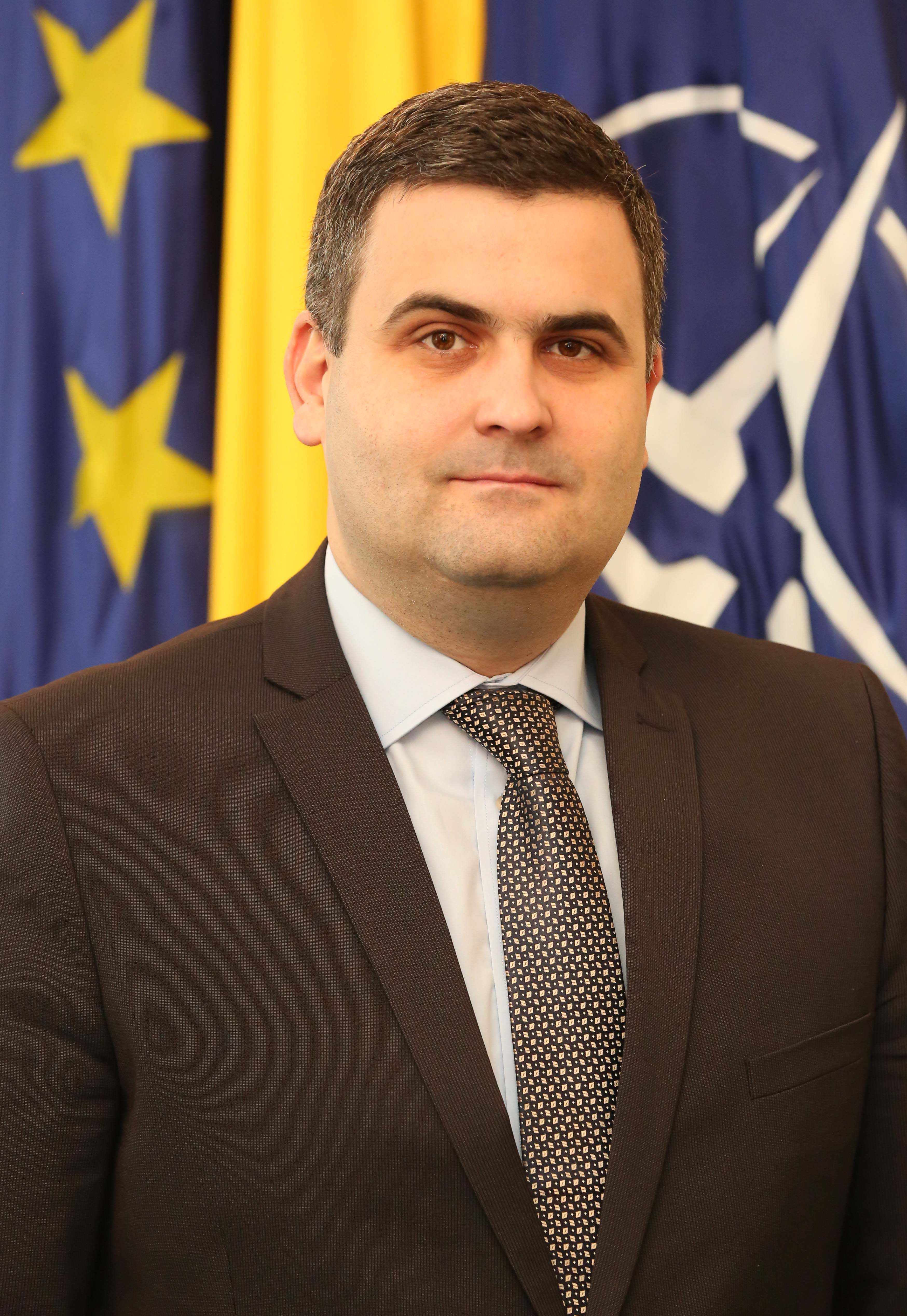 Gabriel-Beniamin Leş, ministrul apărării naţionale: 05.01.2017 - 29.06.2017